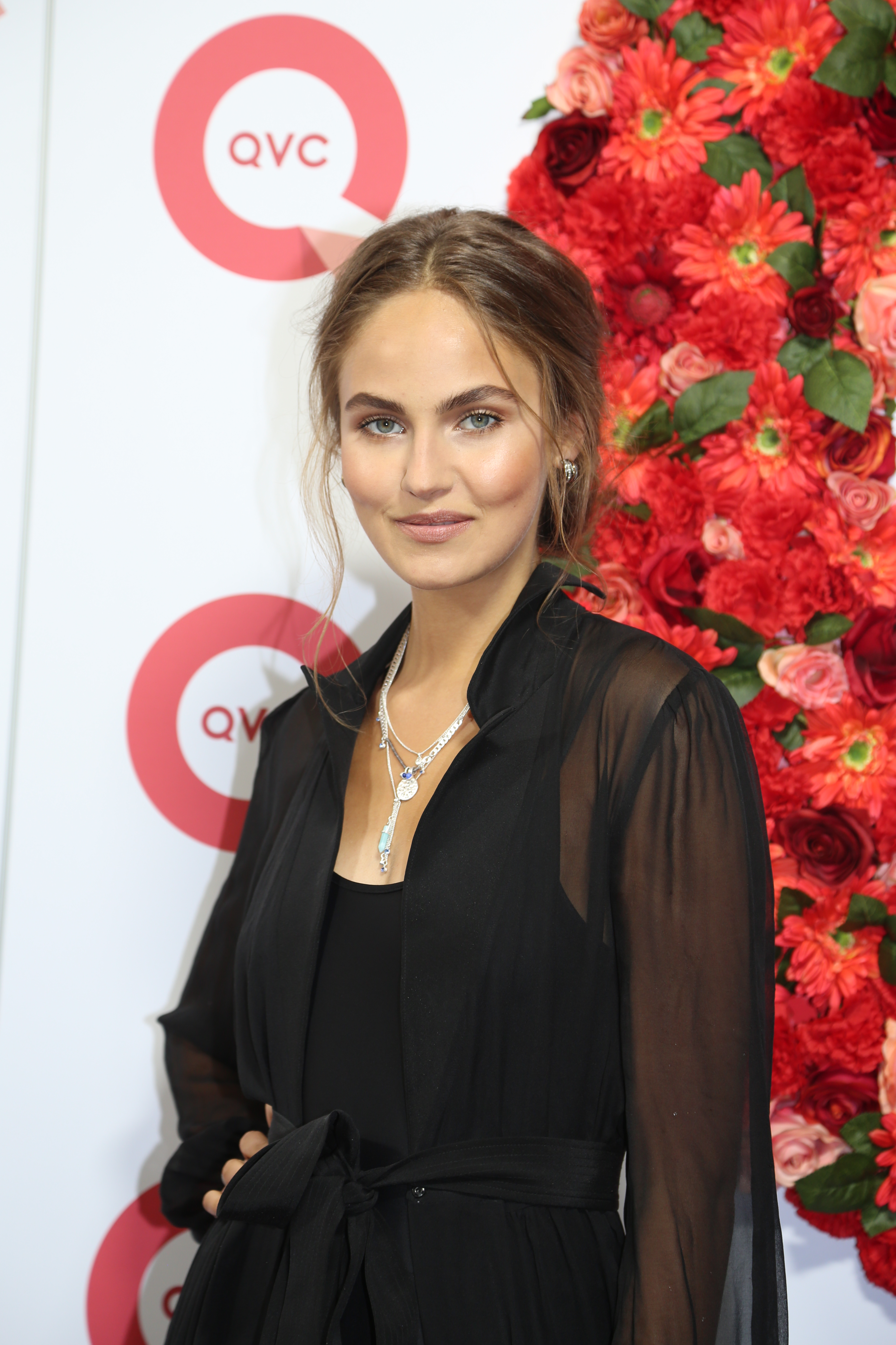 Elena Carrière beim QVC Fashion-Event zur "VOGUE Fashion's Night Out", am 08.09.2017 in Düsseldorf.